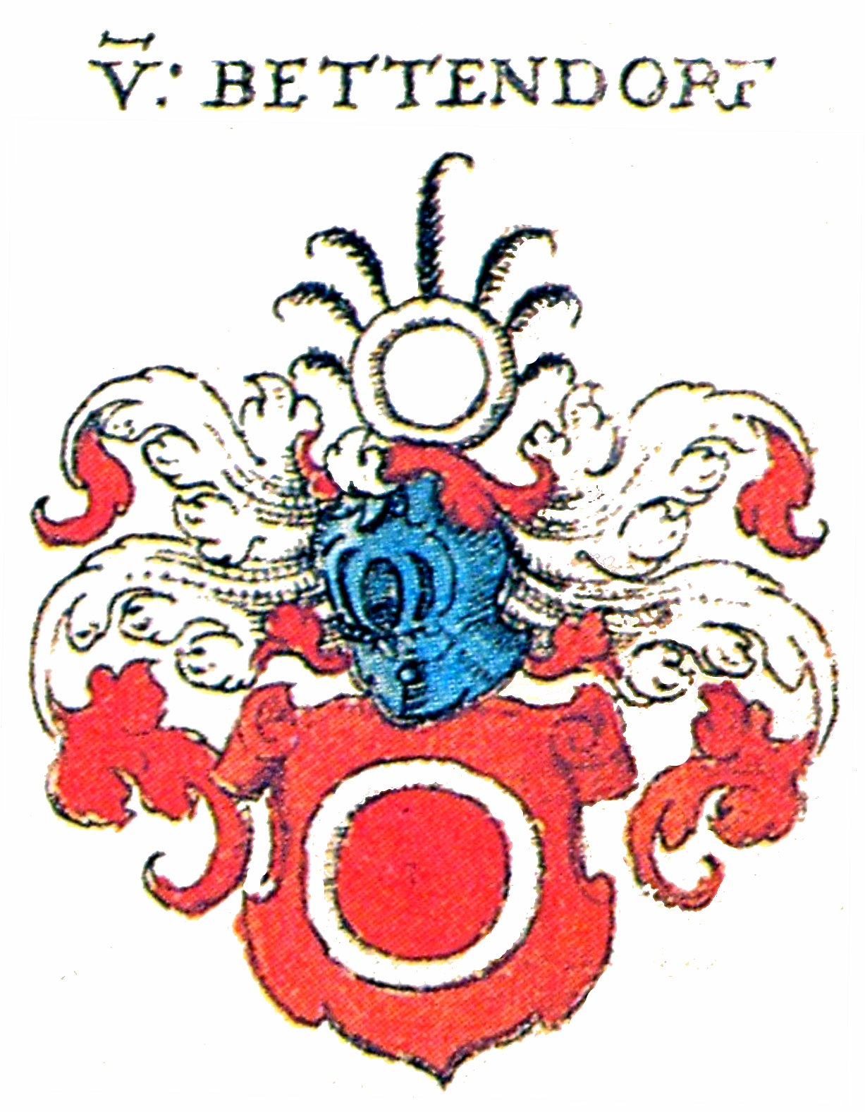 Wappen des Fränkischen Adelsgeschlechts Bettendorf